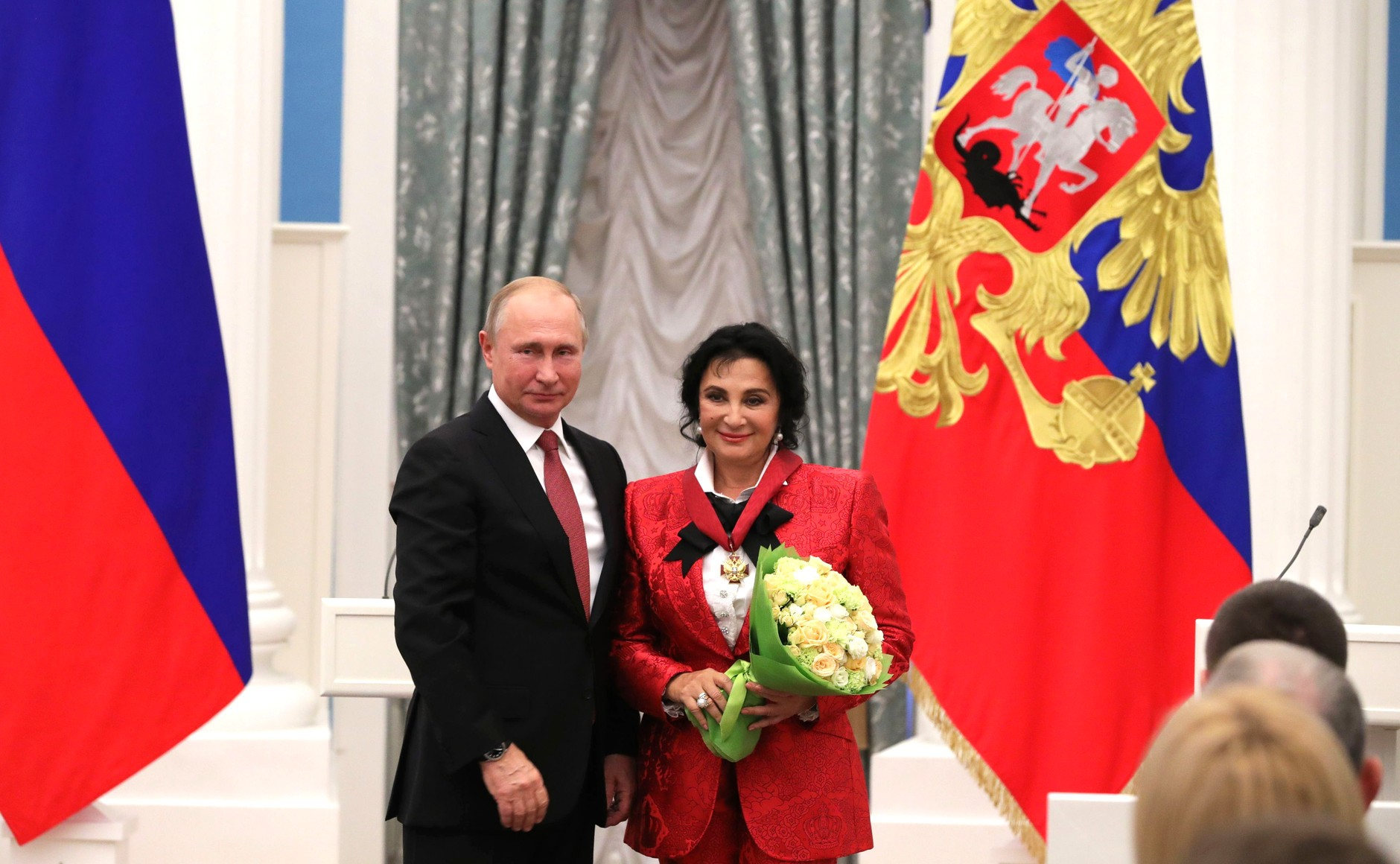 Вручение государственных наград. Орденом «За заслуги перед Отечеством» II степени награждена главный тренер спортивной сборной команды России по художественной гимнастике Ирина Винер-Усманова.